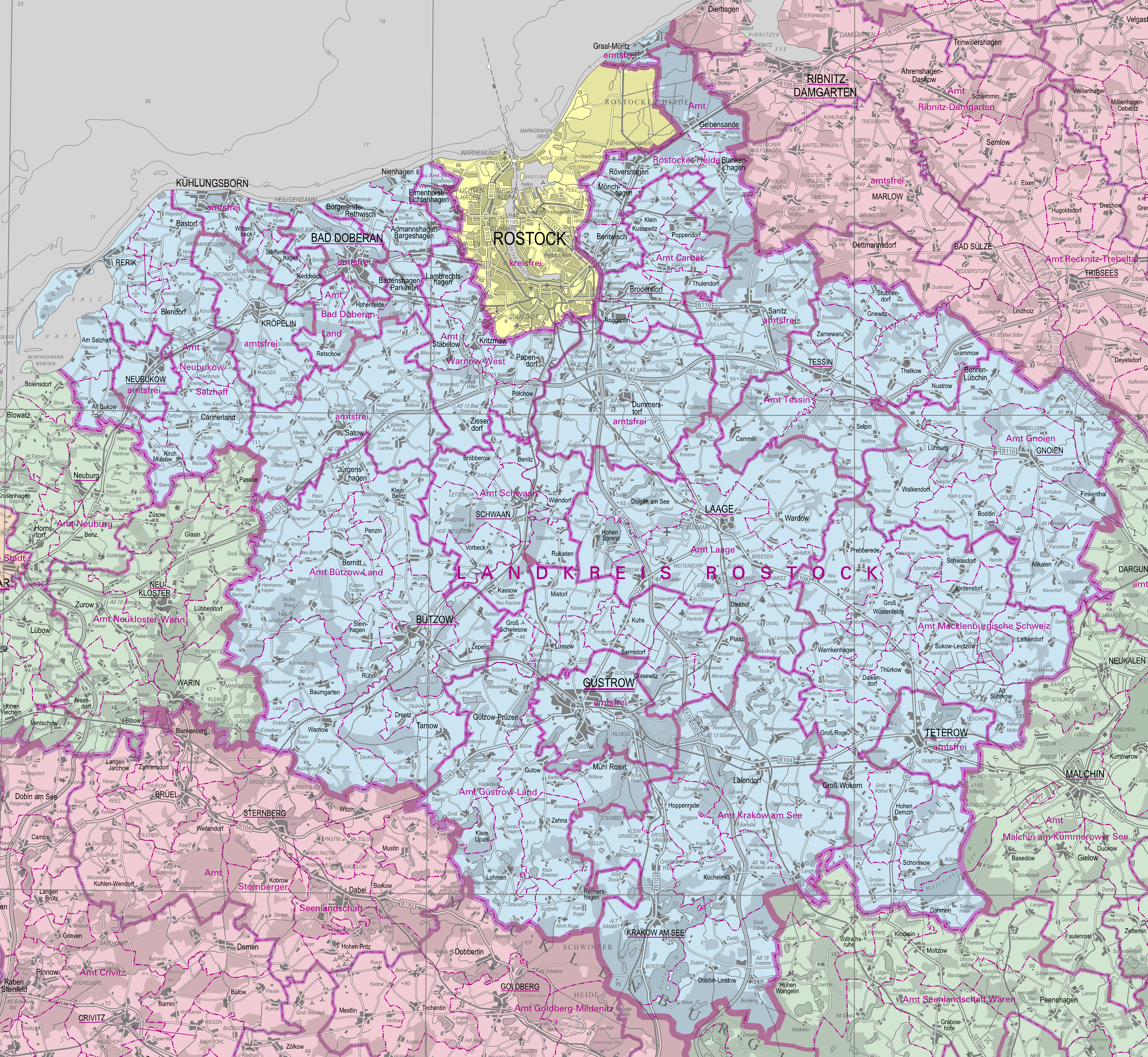 Administrative Karte des Landkreises Rostock 1:250.000, Stand 1. April 2015